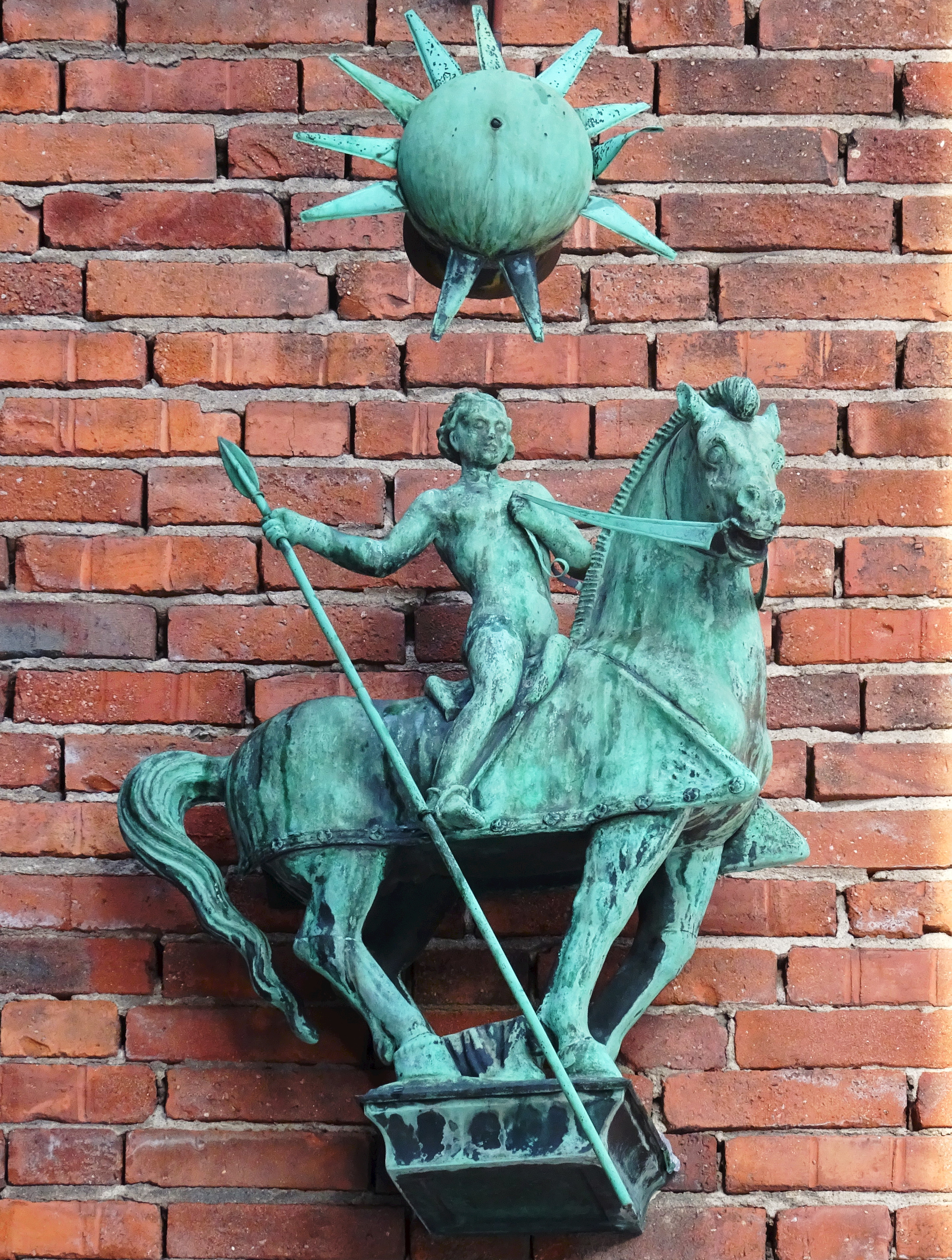 S:t Görans församlingshus, fastighet Herden 7, arkitekt Cyrillus Johansson, skulptur av Aron Sandberg